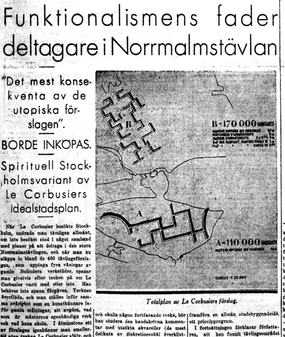 Svenska Dagbladet, tidningsklipp med Le Corbusiers förslag till Norrmalmstävlingen